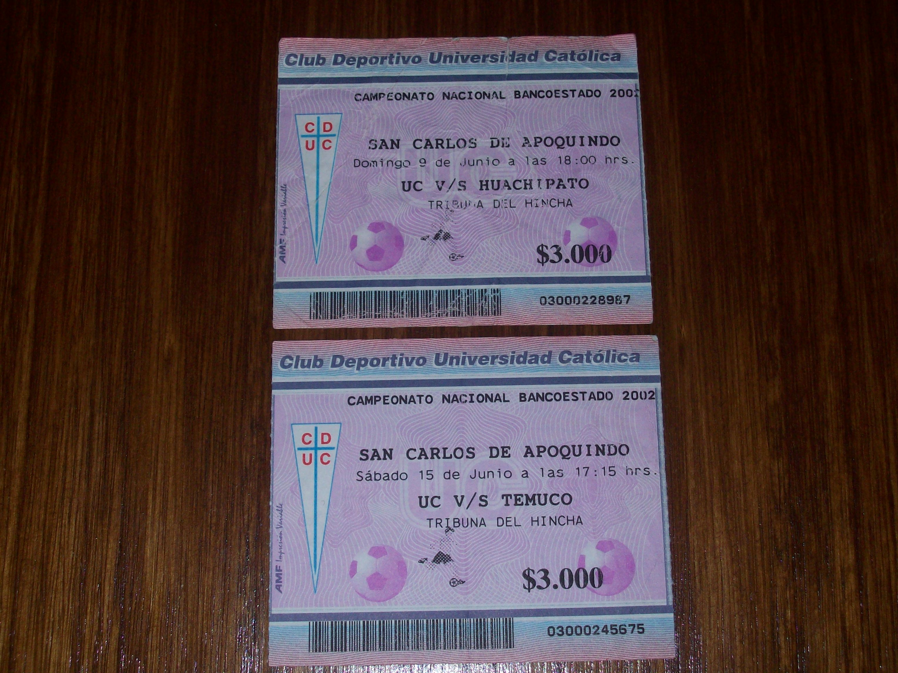 Fotografía de las entradas de los partidos entre Universidad Católica - Huachipato, y Universidad Católica - Temuco, por los playoffs del Apertura 2002.